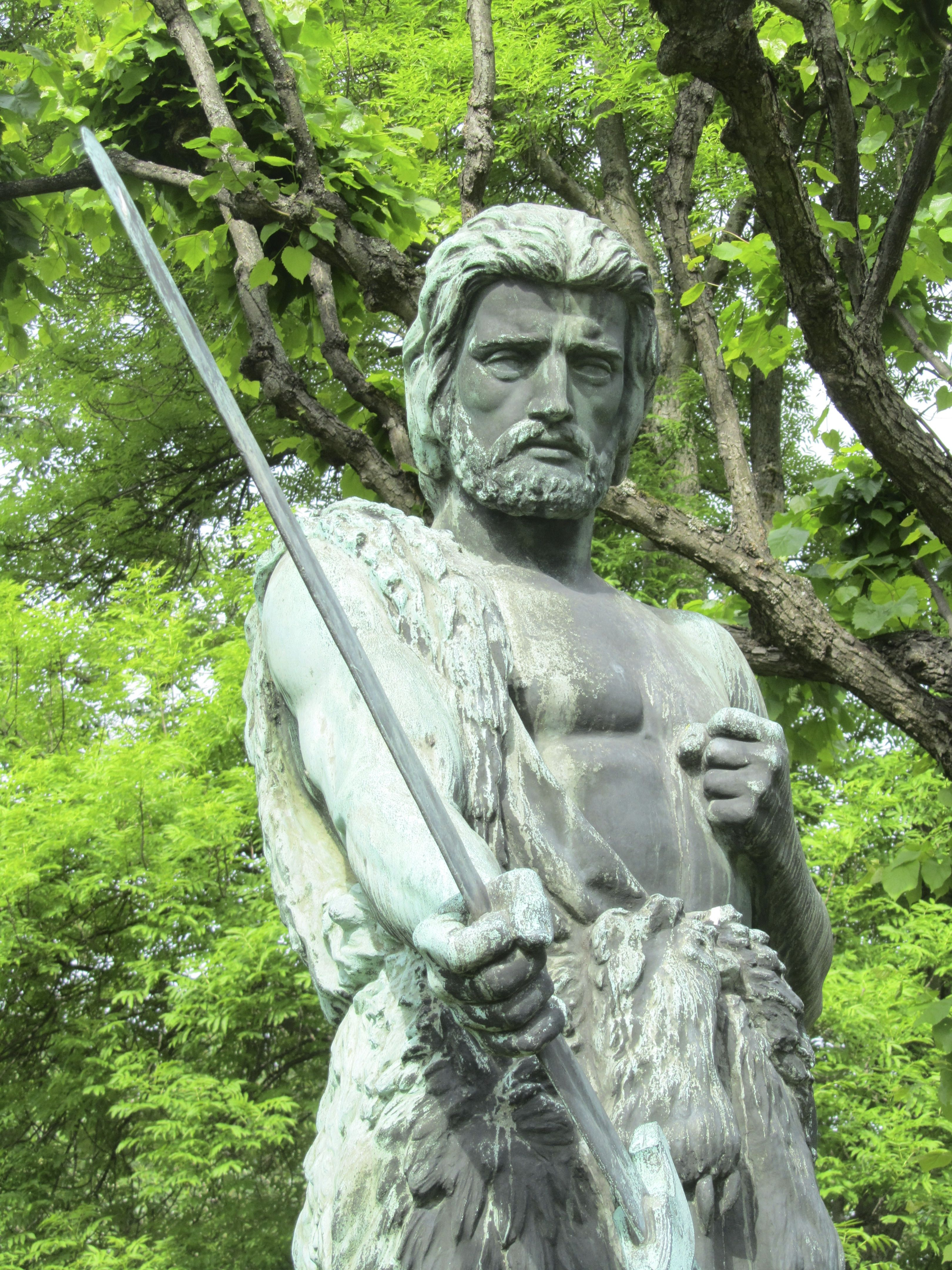 Kullervo puhuu miekalleen (1868) - Carl Eneas Sjöstrand. Sijainti: Talvipuutarha, Taka-Töölö